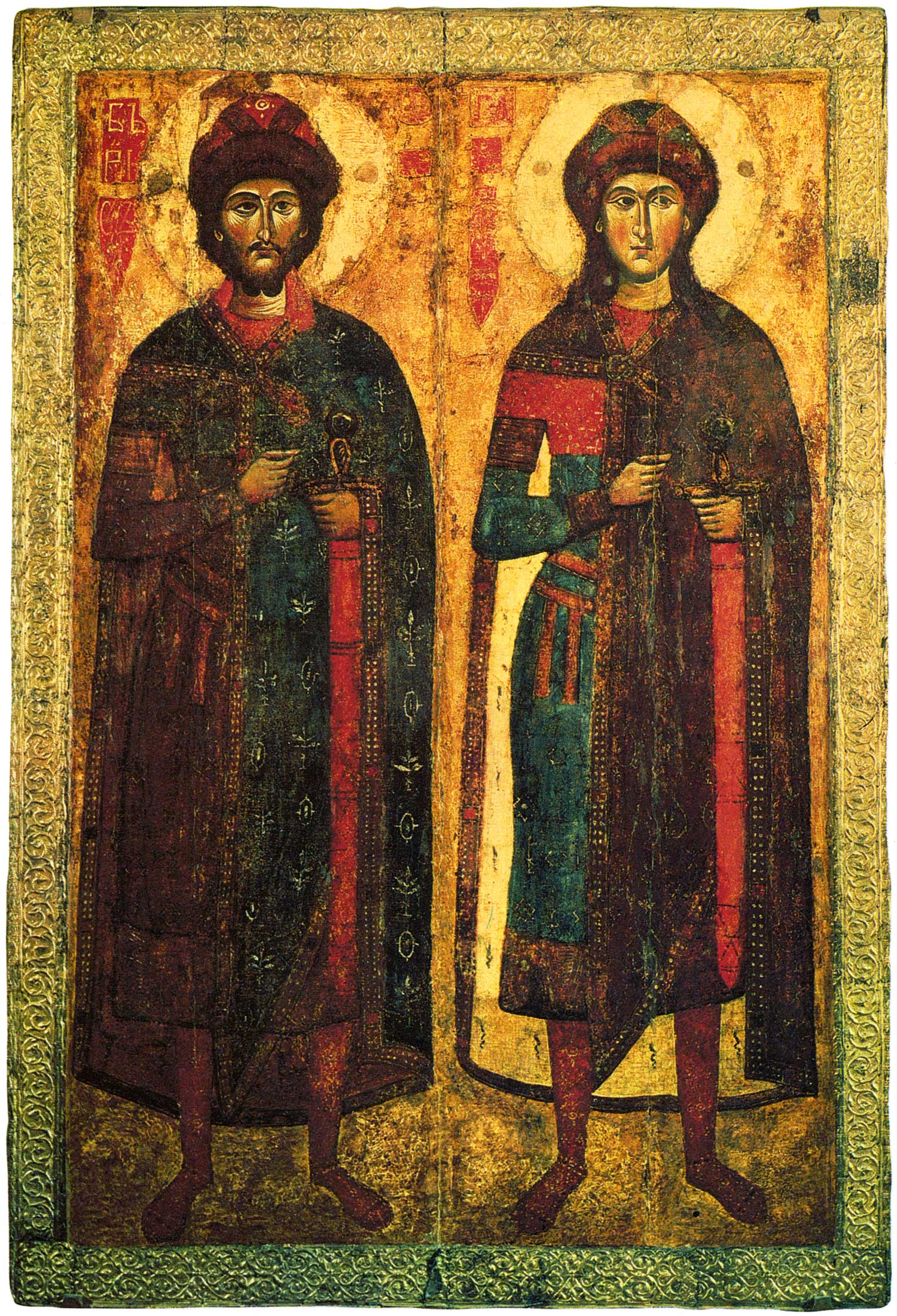 Борис и Глеб. Икона. Начало XIV в. 154 × 104 см. Из Вознесенской церкви новгородского Савво-Вишерского монастыря. Музей русского искусства, Киев, Украина